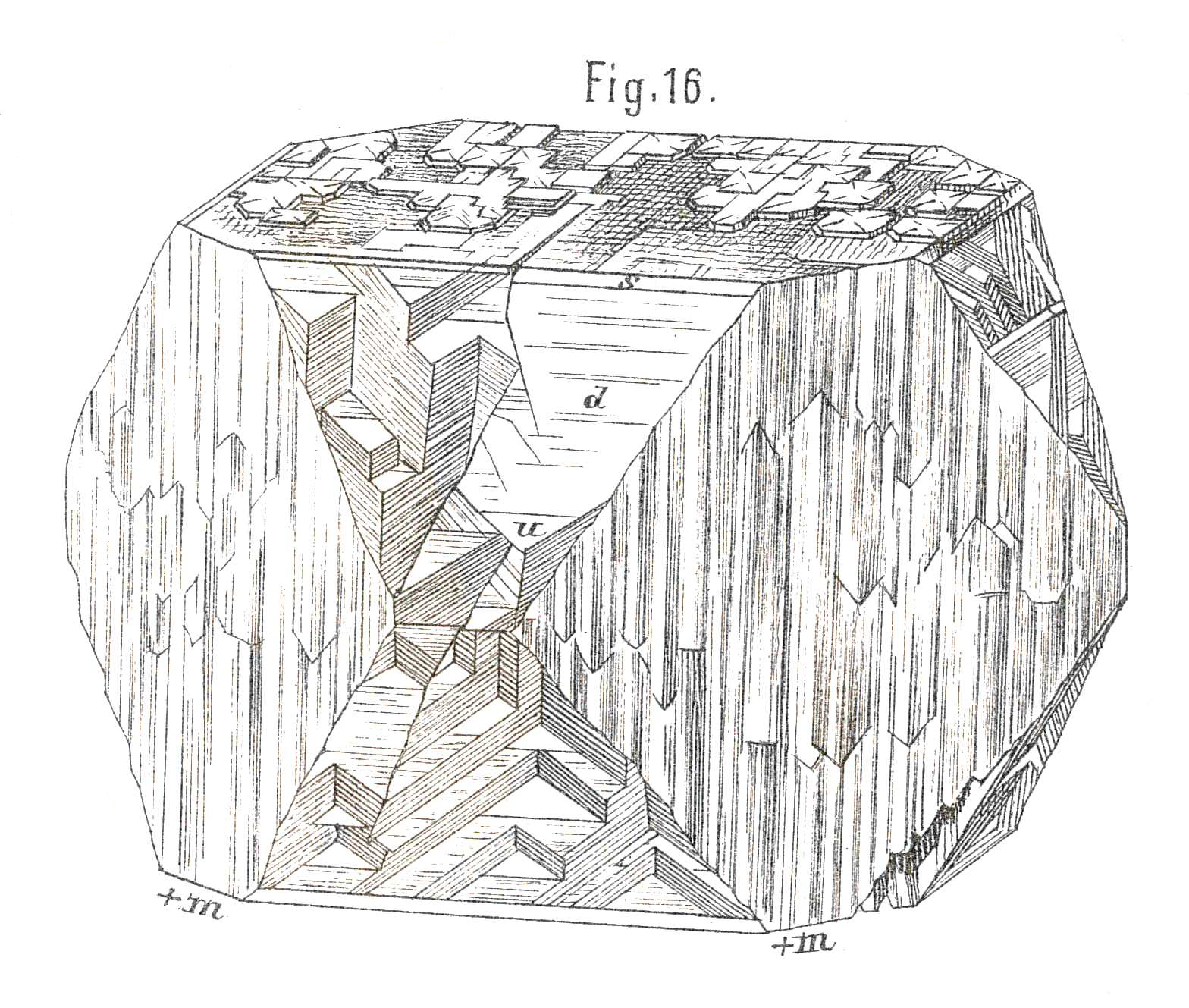 Apophyllit aus Pune (früher Poonah) mit Längsstreifung, entstanden durch Baufehler mit Bildung zahlloser aneinandergrenzender Subindividuen